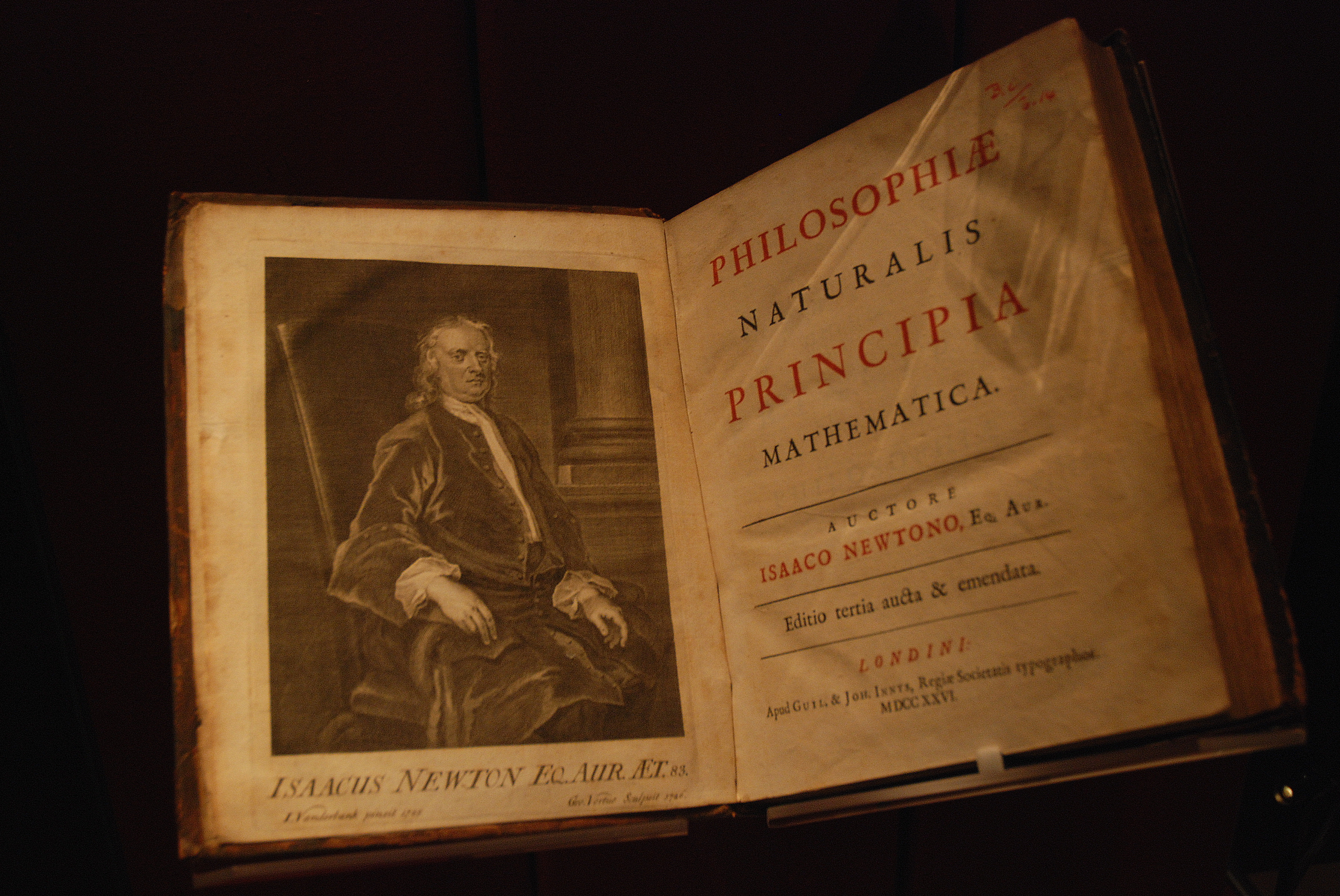 De "Philosophiae Naturalis Principia Mathematica" van Isaac Newton in de "John Rylands Library" in Manchester, Engeland